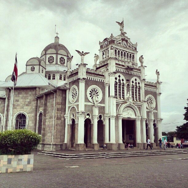 Basílica de los Ángeles